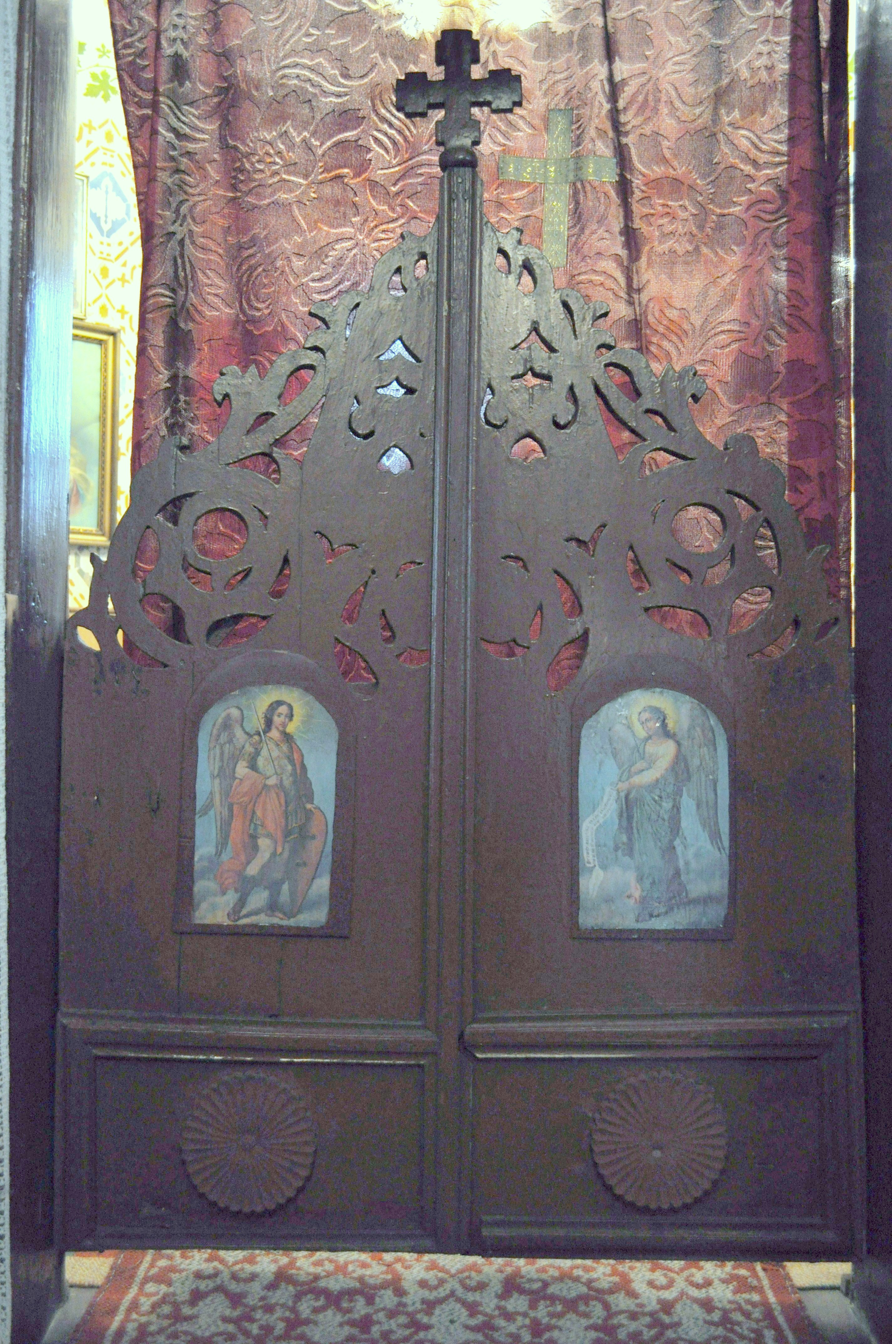 Biserica de lemn din Ciurila, județul Cluj